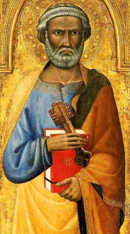 detail